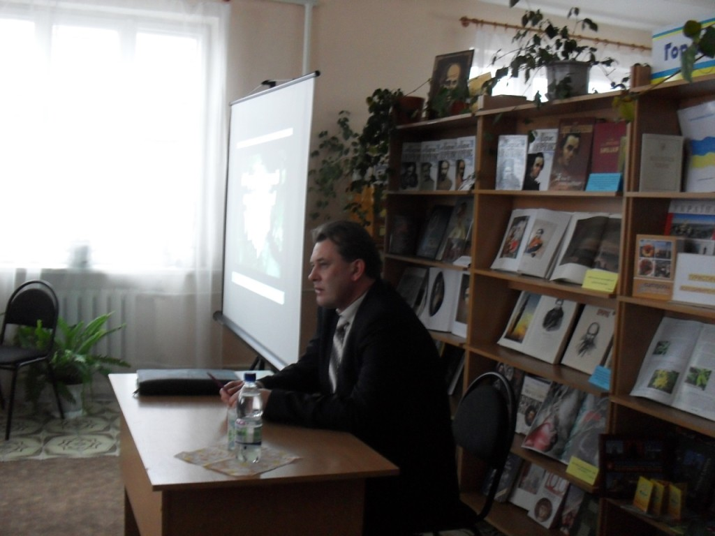 Тренінг в рамках проекту «Планування сім’ї та репродуктивне здоров'я населення»